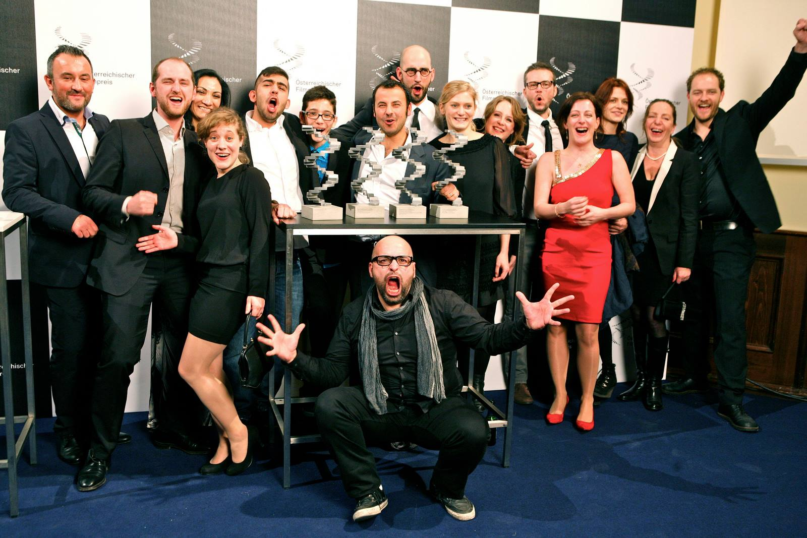 Adem Karaduman 2013